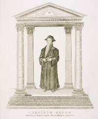 Kálvin János Lenhardt Sámuel metszetén, papír, 46 x 32 cm